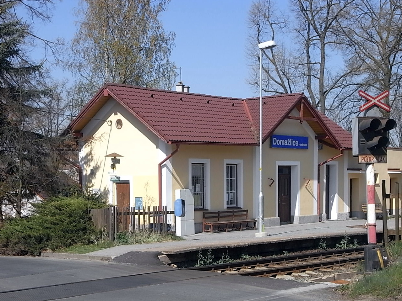 Haltestelle Domažlice město in Taus (CZ).